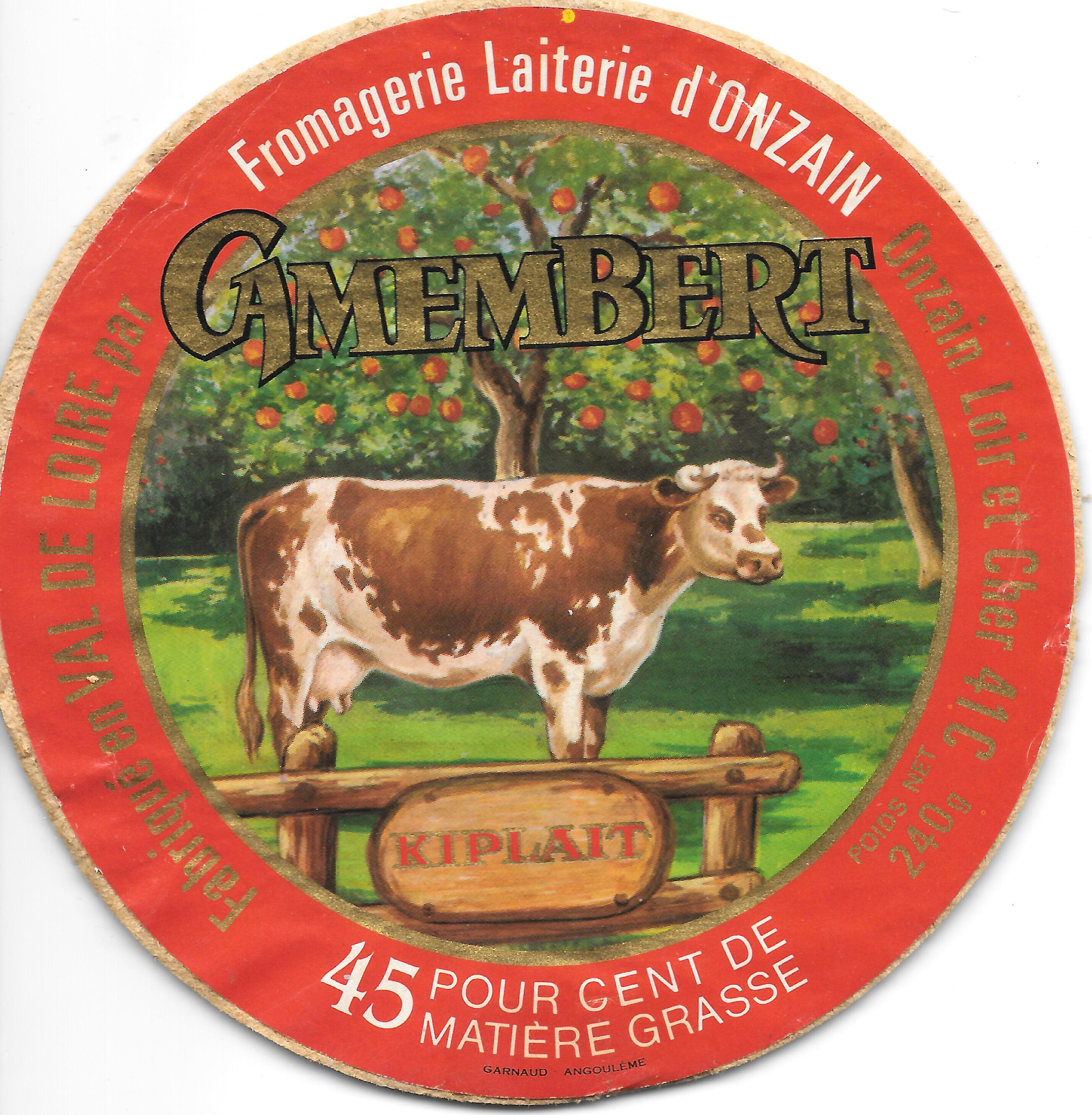 Ancienne étiquette de fromage